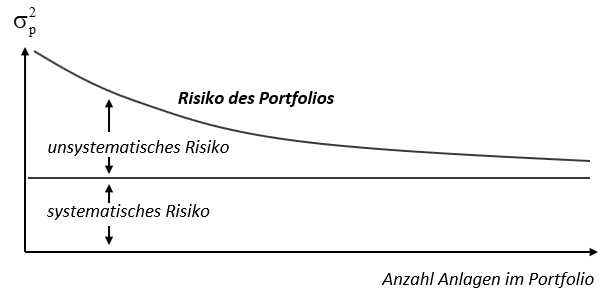 Portfoliobildung